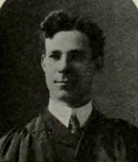 Leslie Charles Coleman (16 June 1878 - 14 September 1954)